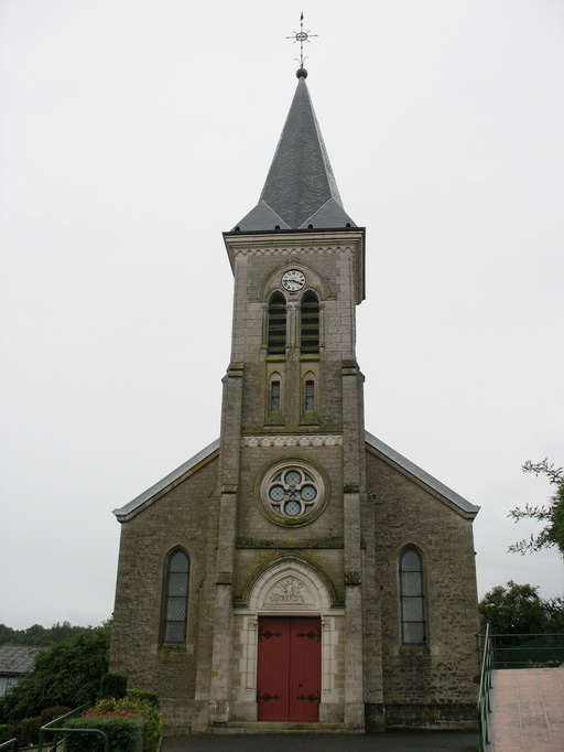 Eglise Saint Barthélémy